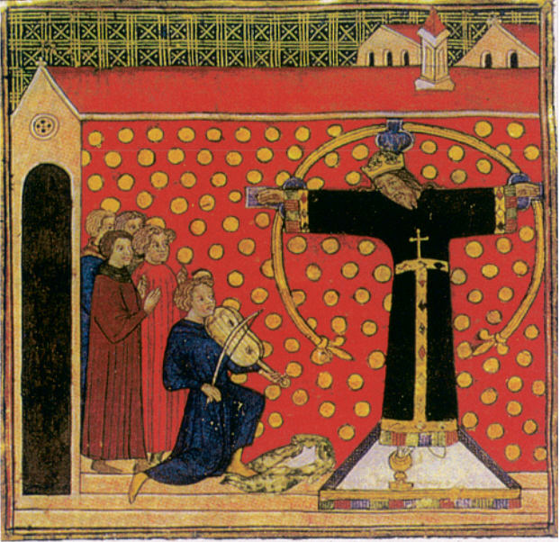 Miniatur des Luccheser Kreuzes im Codex Rapondi (Paris, ca. vor 1400 bis 1420)